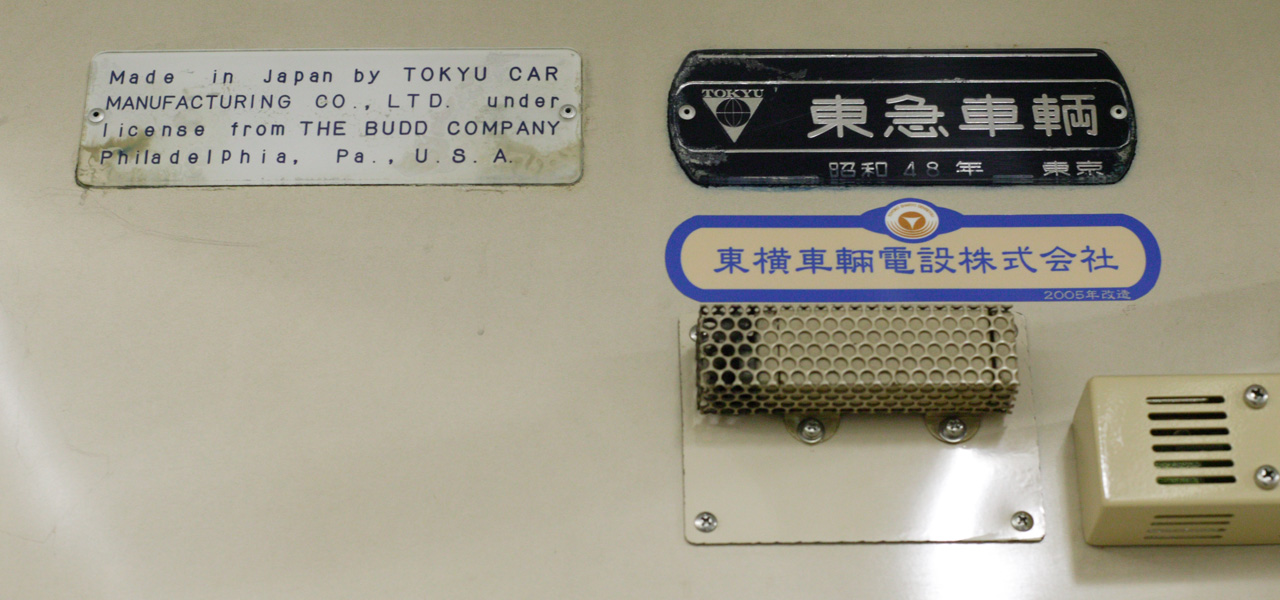 Izukyu 8000 series EMU, Kuha 8004